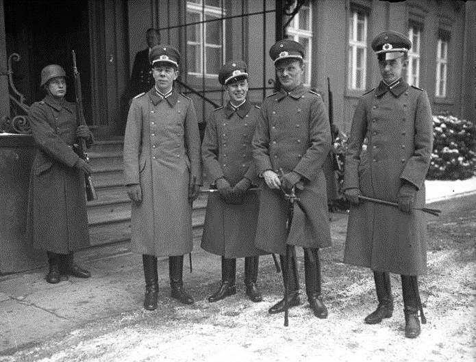 Die Amerika-Reiter beim Reichspräsidenten von Hindenburg! Der Empfang der siegreichen Reiter-Offiziere in Amerika beim Reichspräsidenten von links nach rechts: Oberleutnant Freiherr von Nagel, Oberleutnant Momm, Major Freiherr von Waldenfels, Oberleutnant Hasse. (Kurt / Ernst Hasse?)